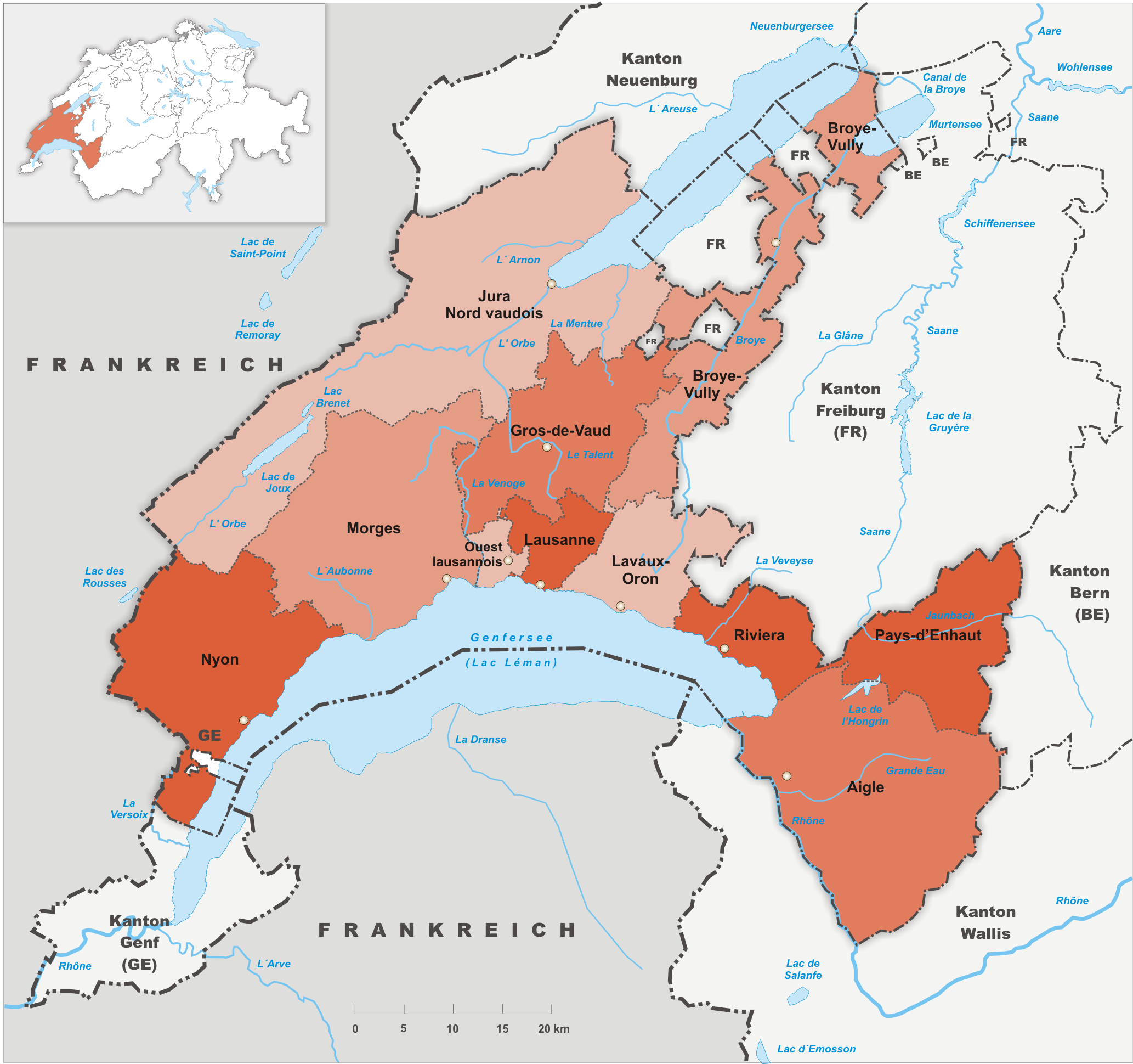 Bezirke des Kanton Waadt.